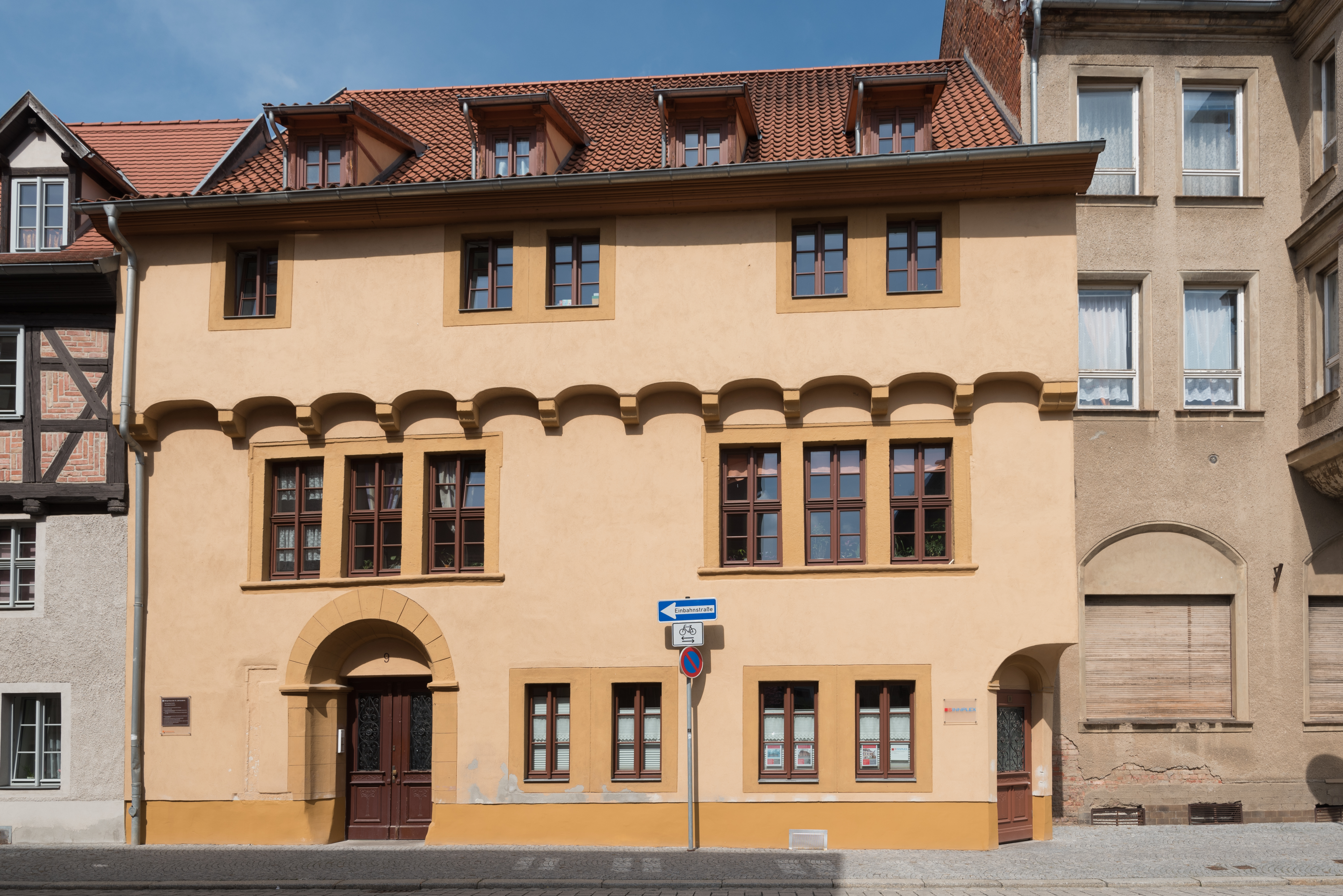 Aschersleben, Über den Steinen 9